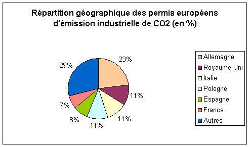 Répartition géographique des permis européens d'émettre du CO2 (en %) (Source : Commission européenne).